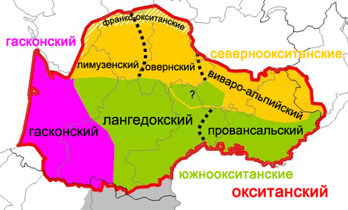 Классификация диалектов окситанского языка (классическая)